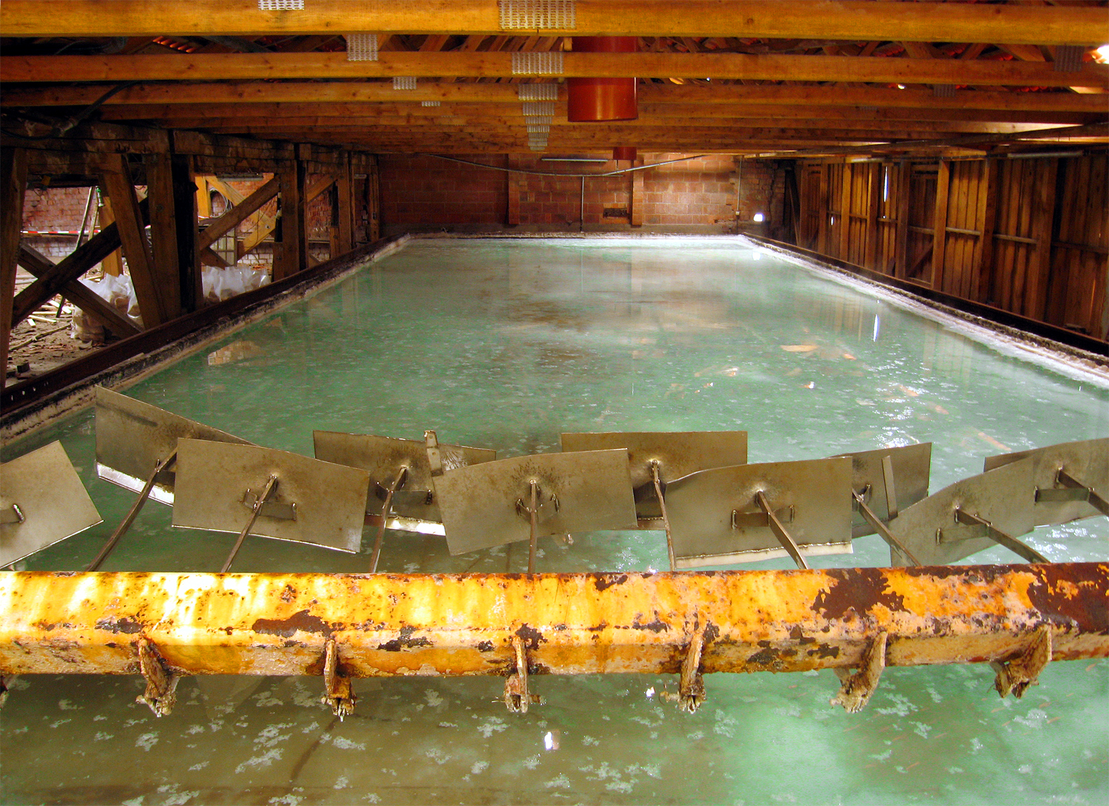 Saline Luisenhall. Siedepfanne. Zur Gewinnung von 1t Salz sind fast 0,5t Steinkohle notwendig